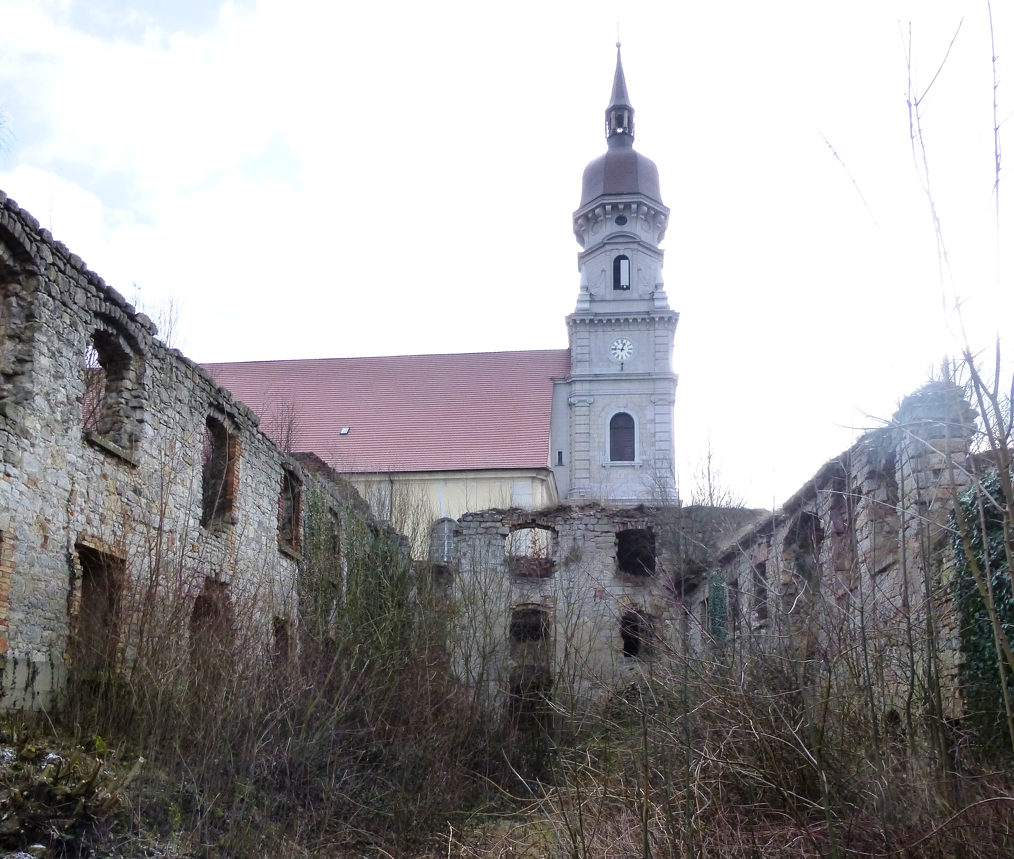 Nowogrodziec - klasztor, 2 poł. XVIII (magdalenek)